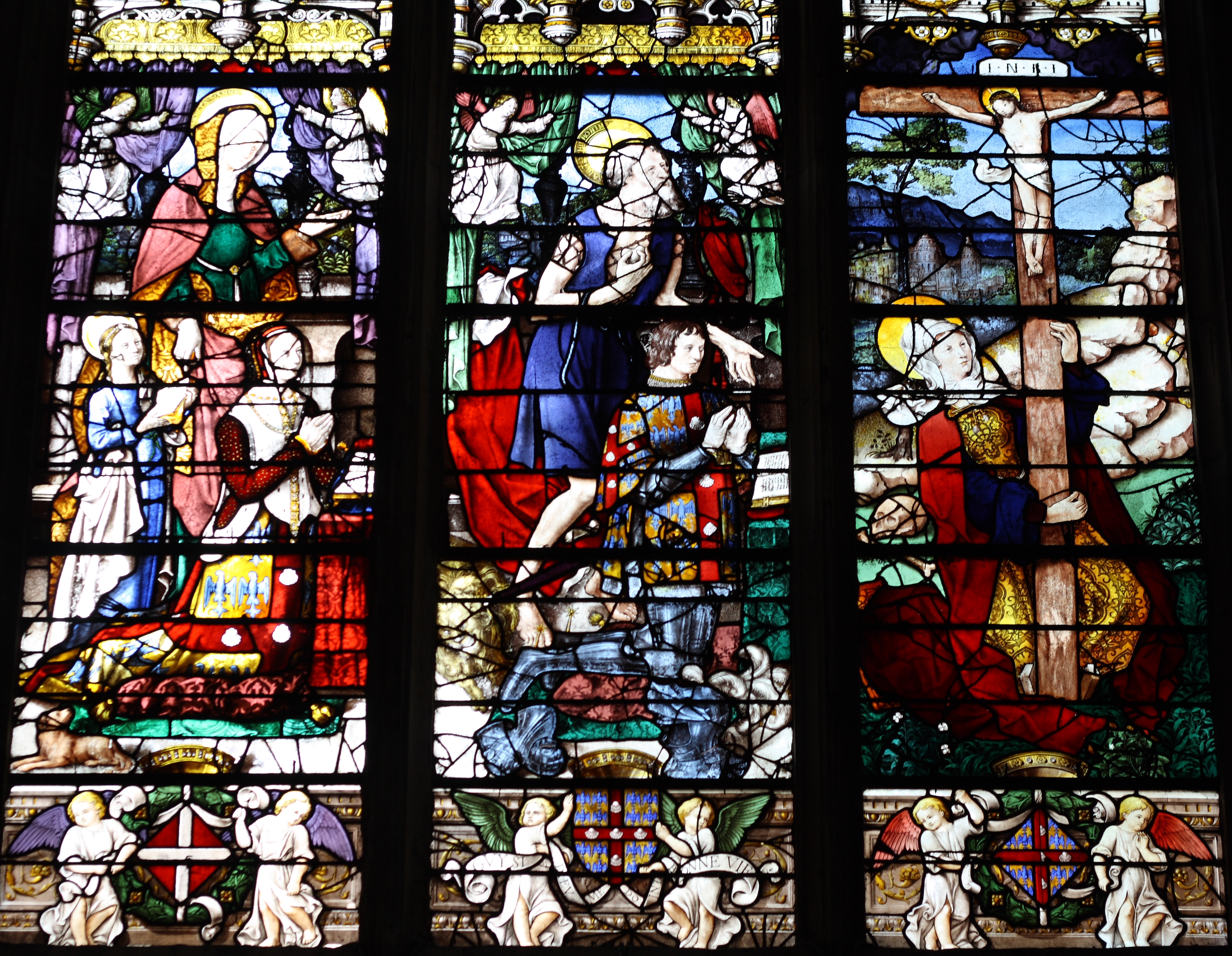 Ausschnitt des Bleiglasfensters Nr. 5 (16. Jahrhundert) in der katholischen Pfarrkirche Saint-Martin (Collégiale Saint-Martin) in Montmorency, Darstellung: Anne de Montmorency mit Tochter und der hl. Anna (links), Guy de Laval mit dem hl. Hieronymus (Mitte) und die hl. Maria-Magdalena am Kreuz Christi (rechts), Karton: Gauthier de Campes, Ausführung: Jean Chastelain (siehe: Dominique Foussard, Charles Huet, Mathieu Lours: Églises du Val-d'Oise. Pays de France, Vallée de Montmorency, Société d'Histoire et d'Archéologie de Gonesse et du Pays de France, 2. Auflage, Gonesse 2011, ISBN 9782953155426)